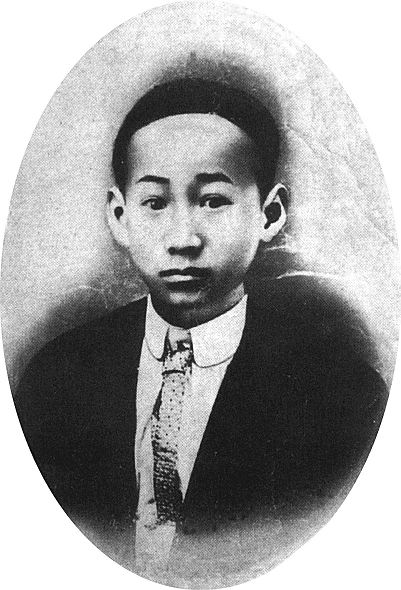 陸皓東幼年像。